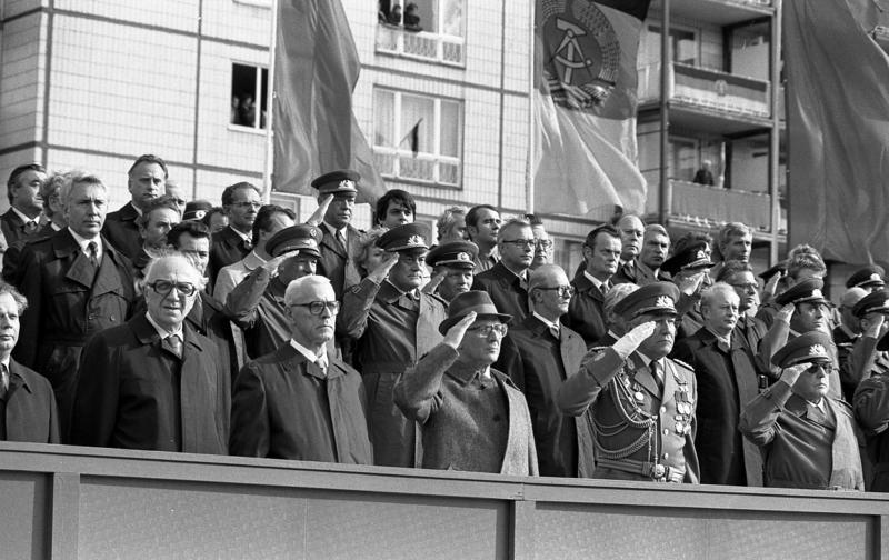 Berlin, Jahrestag der DDR, Parade, Ehrentribüne ADN-ZB/Mittelstädt 7.10.81 Berlin: 32. Jahrestag der DDR - Ehrenparade der NVA Auf der Ehrentribüne in der Karl-Marx-Allee hatten sich die Mitglieder der Partei- und Staatsführung der DDR eingefunden. Von links: Horst Sindermann, Willi Stoph, Erich Honecker, Heinz Hoffmann, Erich Mielke. Abgebildete Personen: Mielke, Erich: Minister für Staatssicherheit, Armeegeneral, Politbüro des Zentralkomitees (ZK) der SED, DDR (GND 118977490) Sindermann, Horst: Volkskammerpräsident, stellvertretender Staatsratsvorsitzender, DDR Stoph, Willi: Ministerpräsident, Staatsratsvorsitzender, Armeegeneral, SED, DDR Honecker, Erich: Staatsratsvorsitzender, Generalsekretär des ZK der SED, DDR (GND 118553399) Hoffmann, Heinz: Minister für Nationale Verteidigung, Mitglied des ZK der SED, DDR